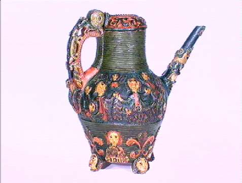 Tutekanne fra Numedal i Buskerud, skåret av Iver Gundersen Øvstrurud omkring 1770. Høyde 32,5 cm. Foto Norsk Folkemuseum, NF.1915-1102.